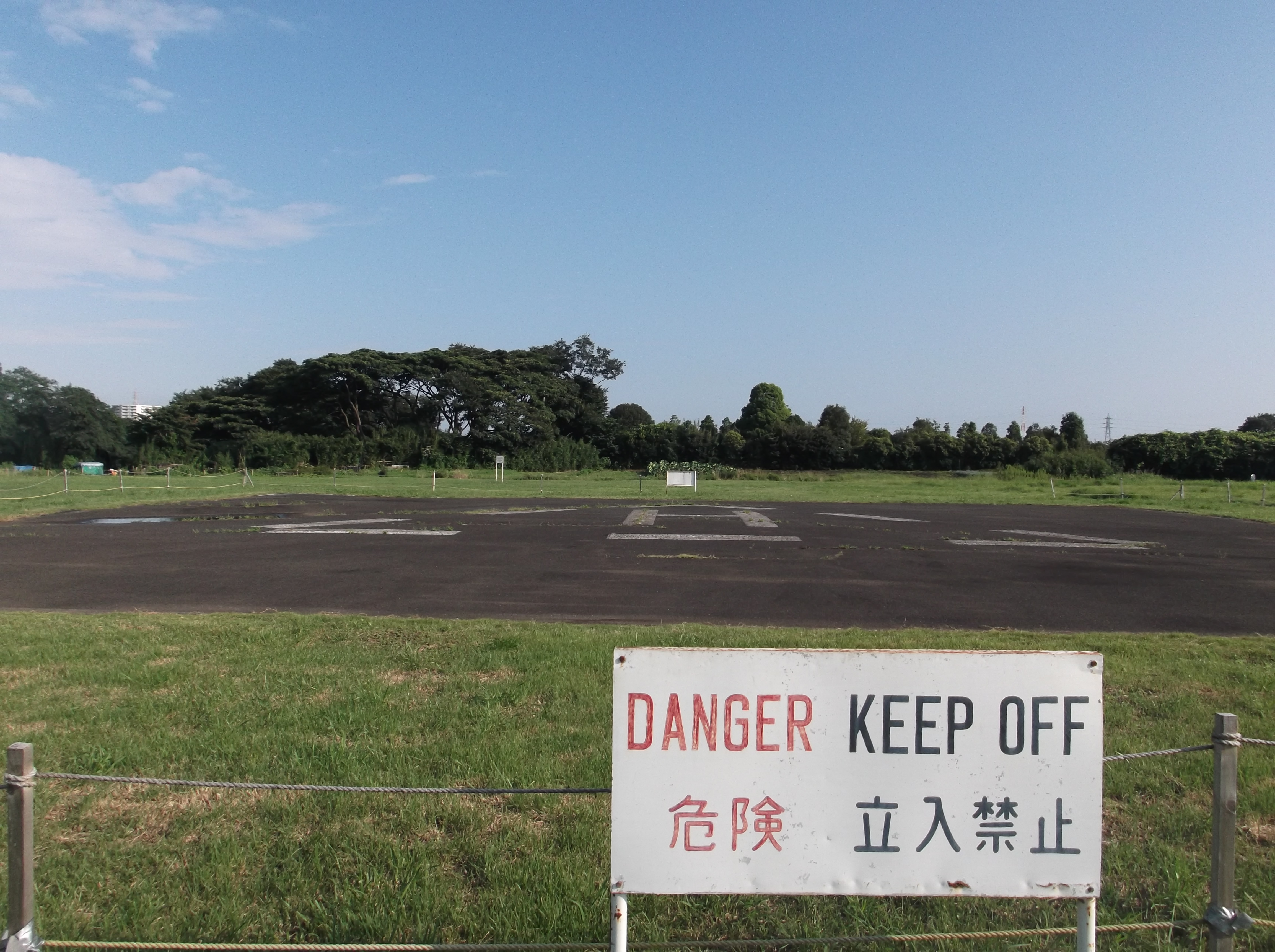 上瀬谷通信施設の海軍広場のヘリポート。消防訓練による一般開放にて撮影